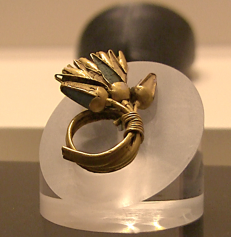 Archäologisches Museum Çorum, Zentraltürkei, goldene Brosche aus Šapinuwa